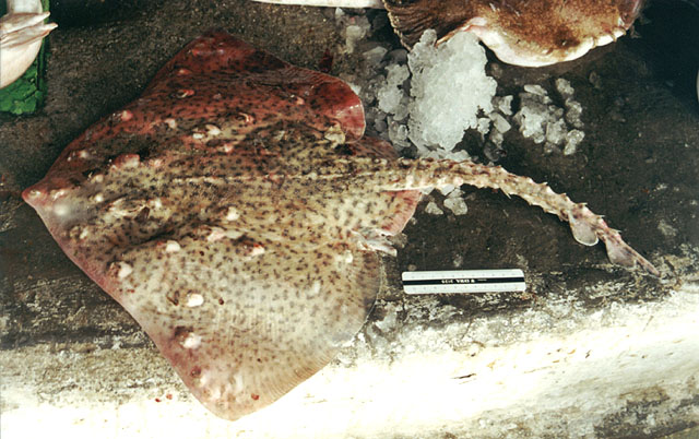 Raja clavata Linnaeus 1758